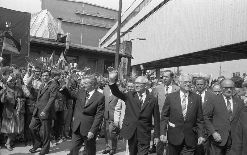 Berlin, Ceausescu-Besuch ADN-ZB-Mittelstädt - 30.5.85-Berlin: Ceausescu-Besuch Der Generalsekretär des ZK der SED und Vorsitzende des Staatsrates der DDR, Erich Honecker, und Nicolae Ceausescu, Generalsekretär der RKP und Präsident der SRR, besuchten das Farbbildröhrenwerk im VEB Werk für Fernsehelektronik Berlin. Betriebsdirektor Horst Kreßner (r.) geleitete die hohen Gäste durch das Werk. Abgebildete Personen: Honecker, Erich: Staatsratsvorsitzender, Generalsekretär des ZK der SED, DDR (GND 118553399) Ceausescu, Nicolae: Präsident, Staatsratsvorsitzender, Generalsekretär des ZK der KP, Rumänien